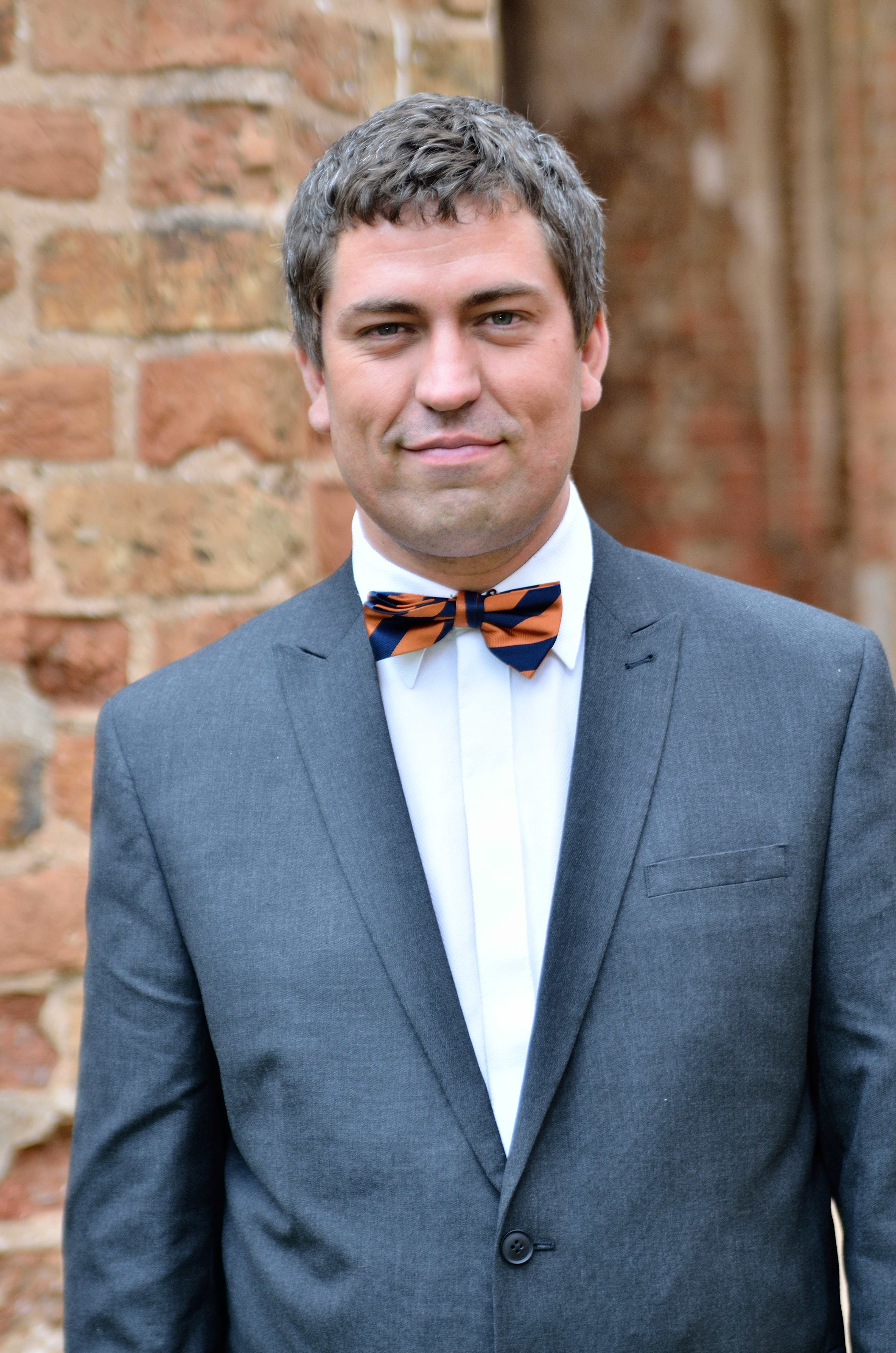 Heiki Haljasorg Toomemäe Tartu piiskopliku Toomkiriku varemetel.